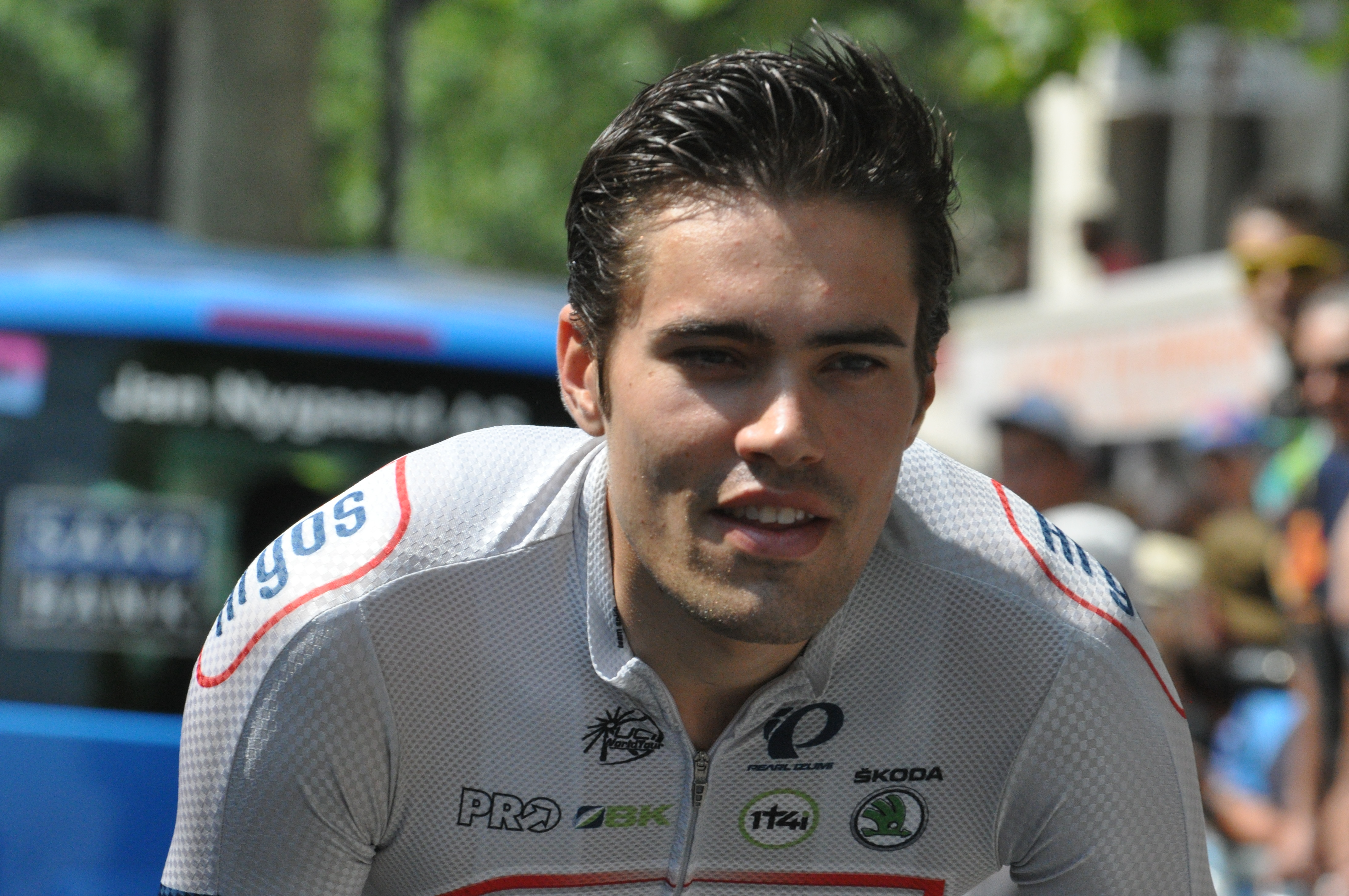 Etape 14 (Saint-Pourçain-sur-Sioule – Lyon) du Tour de France 2013